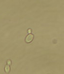 Zoom sur une levure de genre Candida en bourgeonnement. Réalisée à partir de l'image présente sur le Commons et importée par moi-même Raziel 27 juin 2006 à 15:16 (CEST) Image originale Image:Candida.JPG